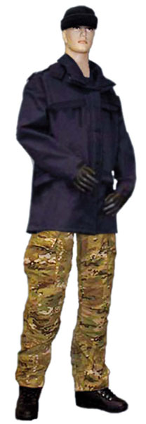 Umundurowanie ćwiczebne zimowe ABW z kurtką paroporzepuszczalną i czapką zimową